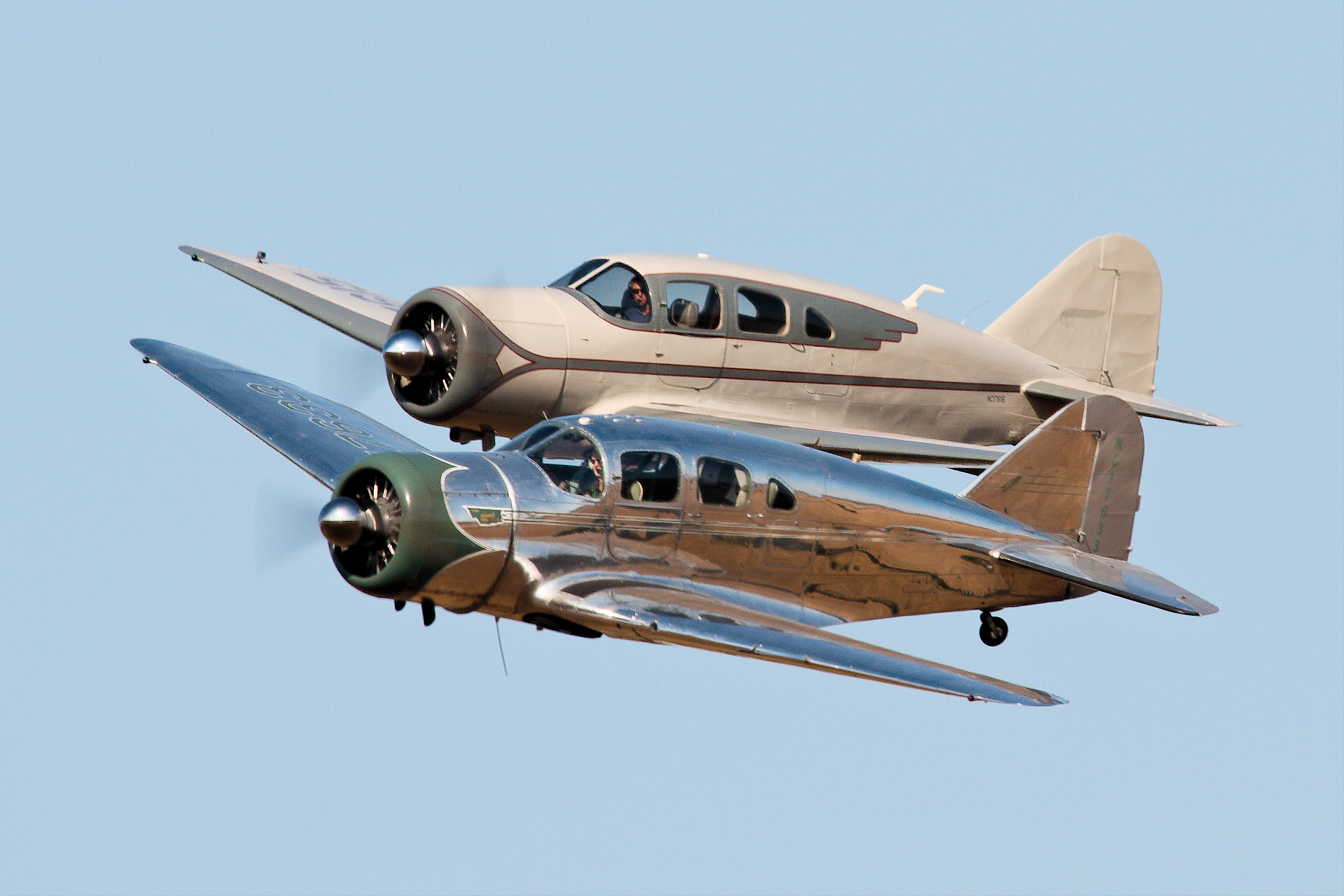 Spartans - Little Gransden 2019